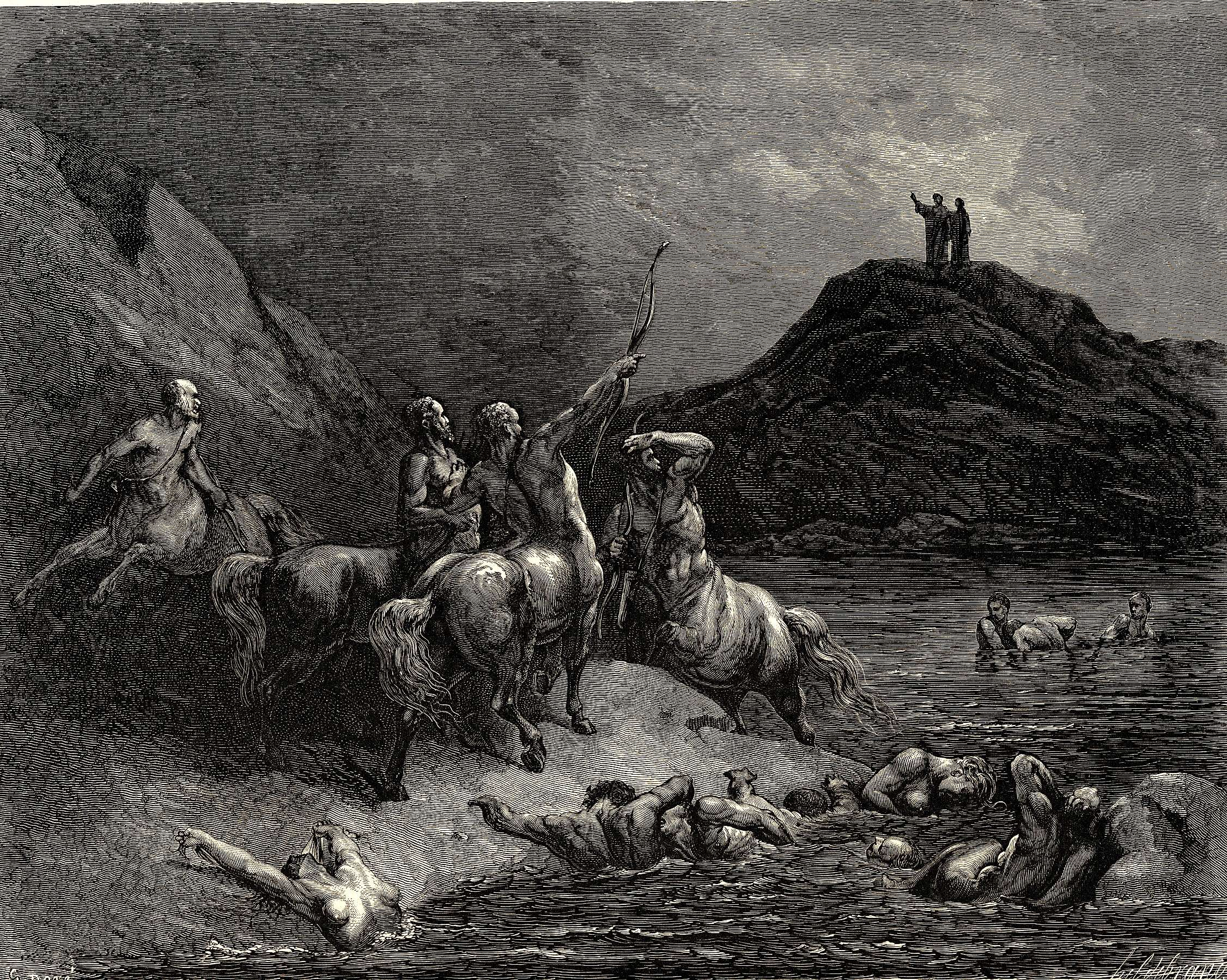 Gustave Doré, The Inferno, Canto 12-1, etching